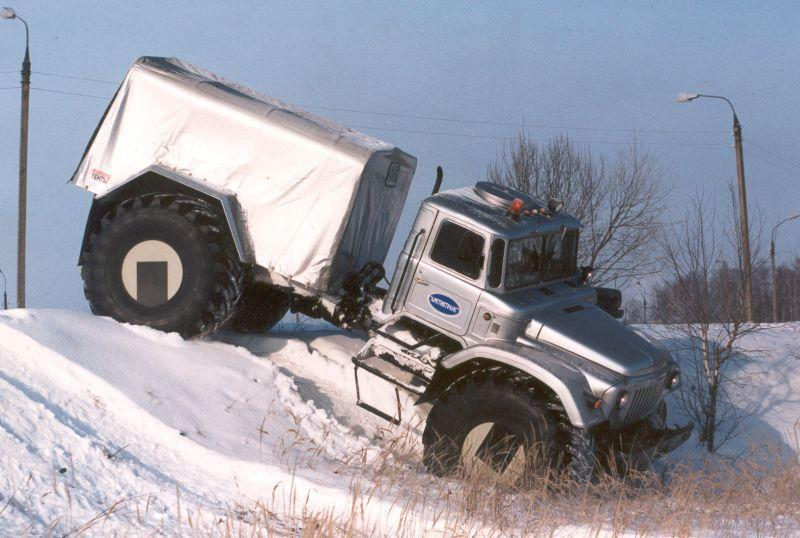 Мамонтёнок — плавающий грузовой вездеход с шарнирно-сочлененной рамой на шинах сверхнизкого давления.